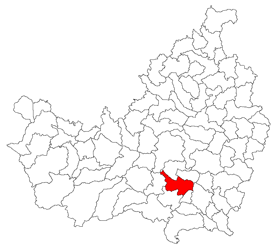 Comuna Tureni, judeţul Cluj